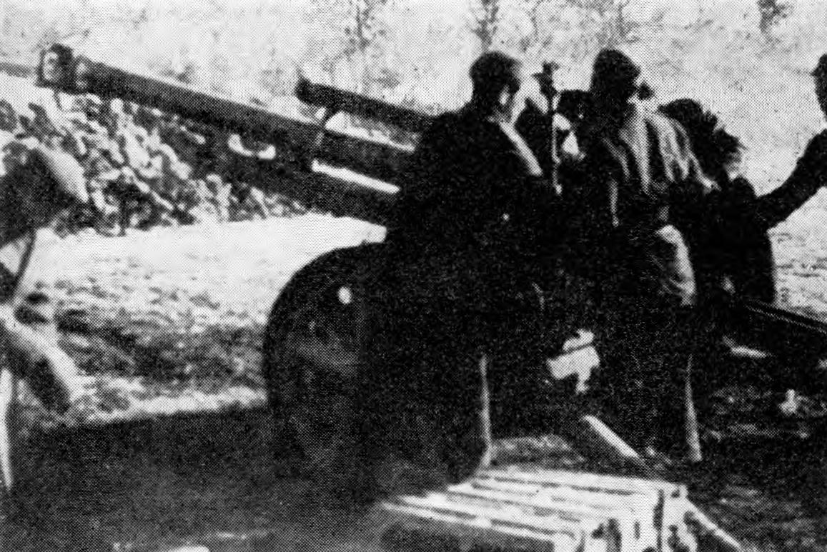 105 mm havbice 2. havbičnega diviziona artilerijske brigade VIII. korpusa na položaju pred Širokim Brijegom 6. in 7. februarja 1944